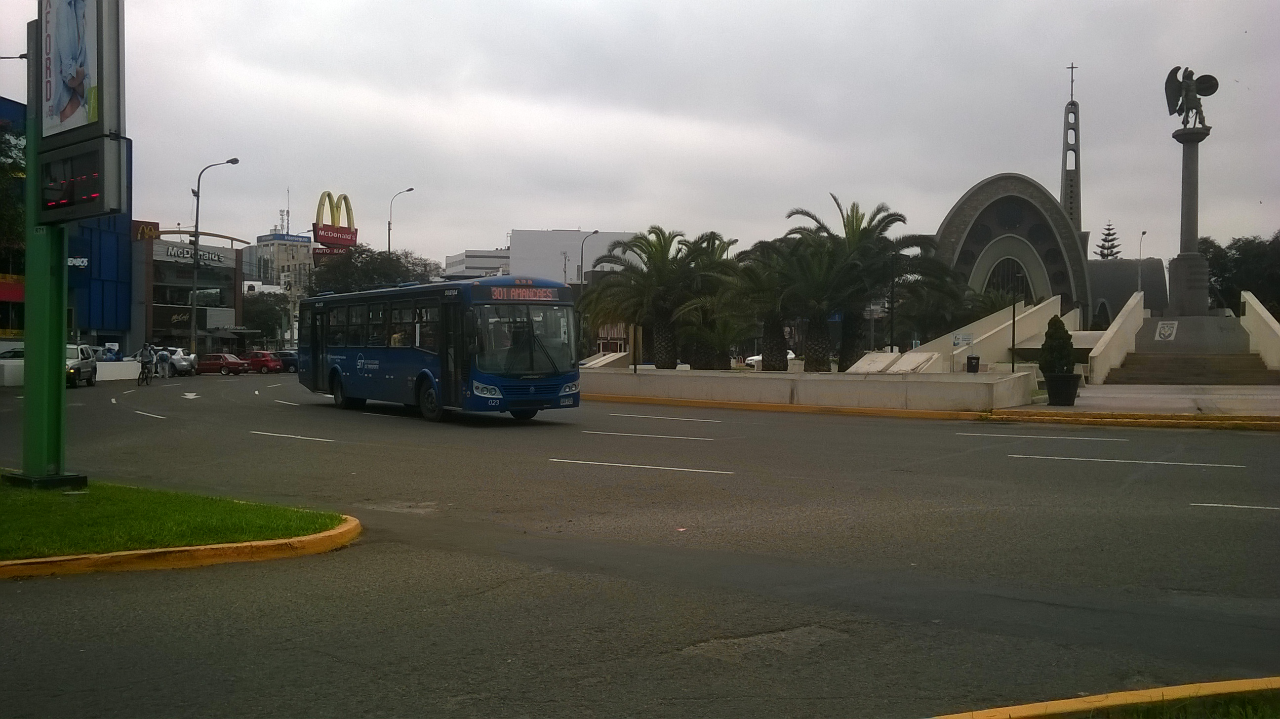 Óvalo Gutiérrez en Lima.